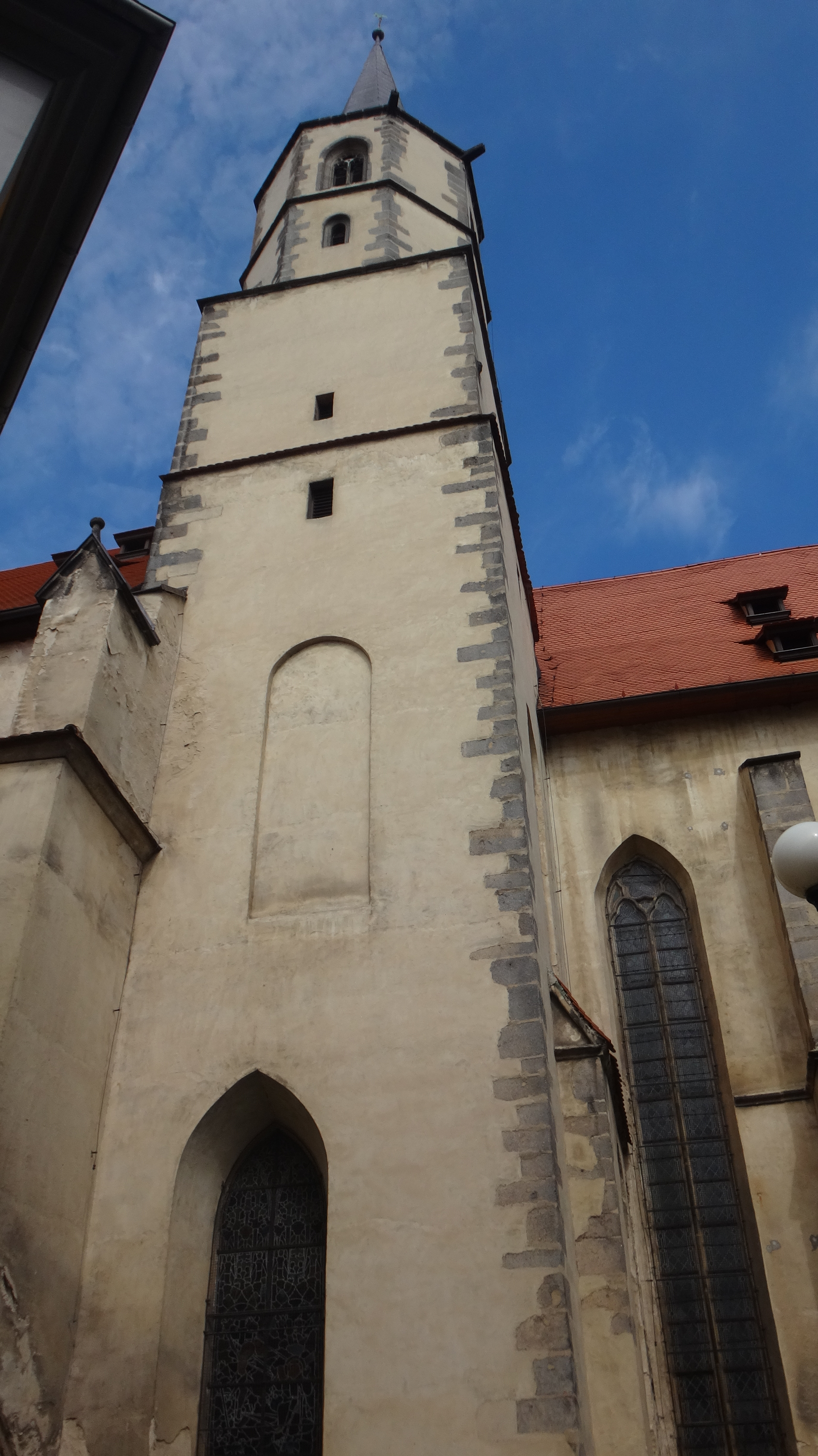 pohled na věž